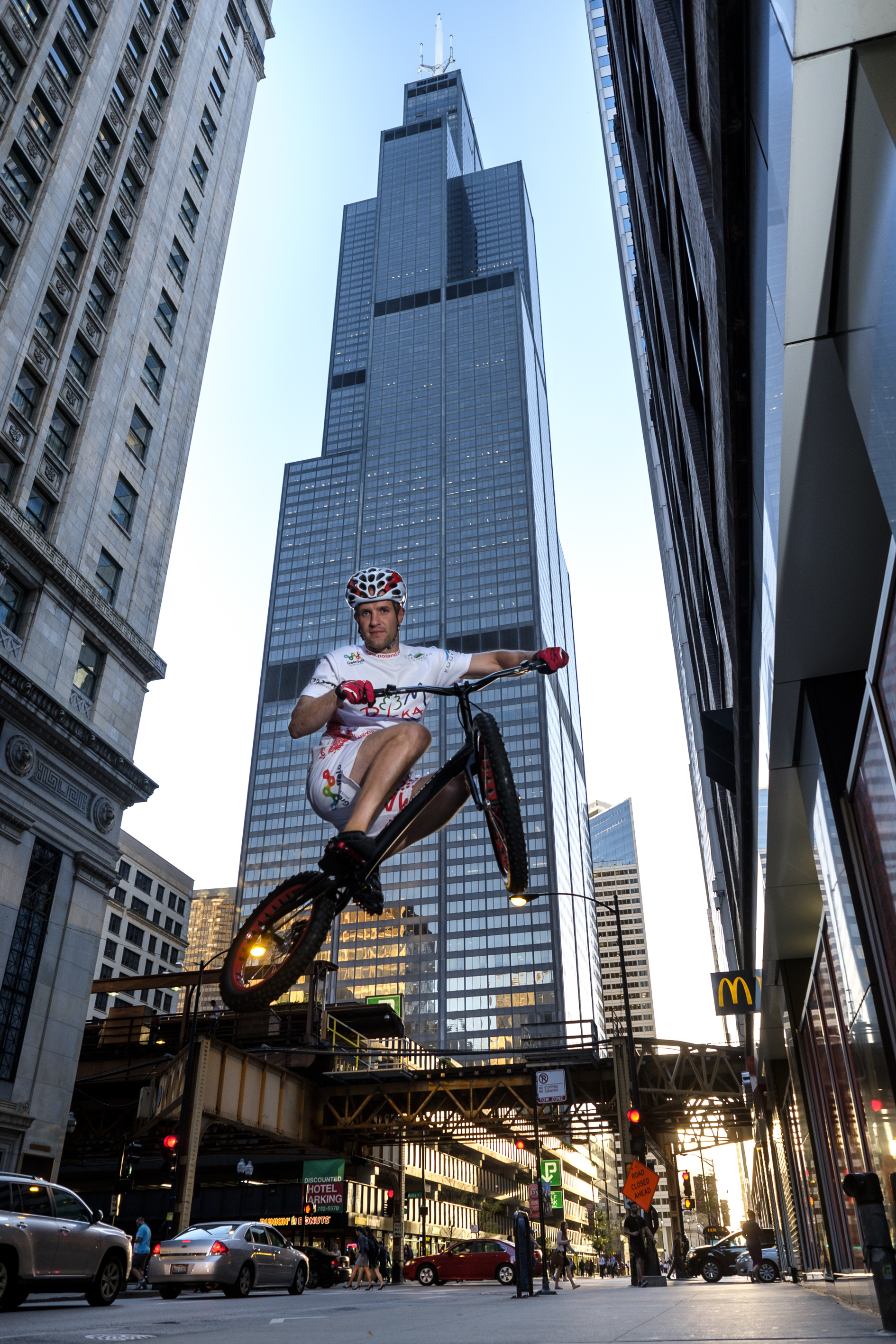 Krystian Herba przed biciem Rekordu Guinnessa w Willis (Sears) Tower w Chicago, USA 2016